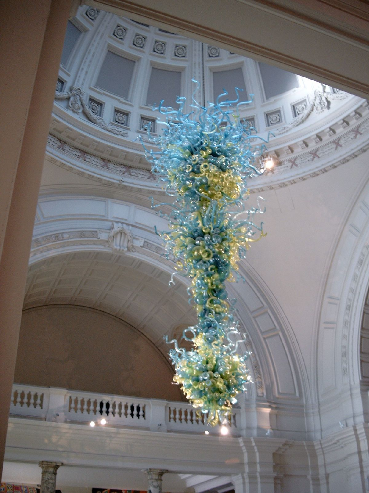 Glazen kroonluchter in de centrale inkomhal van het Victoria and Albert Museum, Londen.